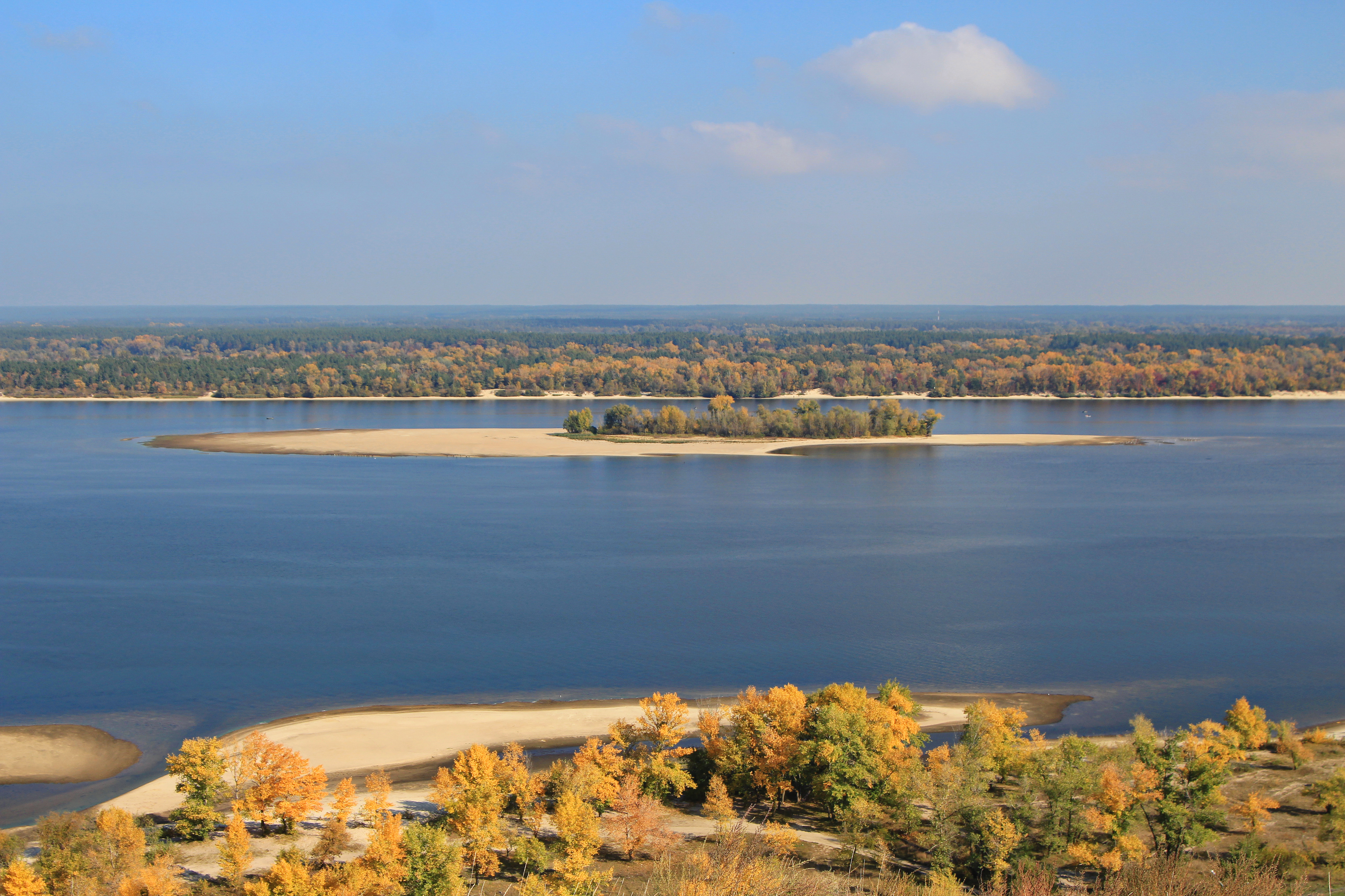 Канівський природний заповідник, м. Канів. Золотоніський район: адмінмежі Бубнівсько-Слобідської сільської ради. Канівський район, адмінмежі Пекарівської, Прохорівської, Хмільнянської, Яблунівської сільських рад